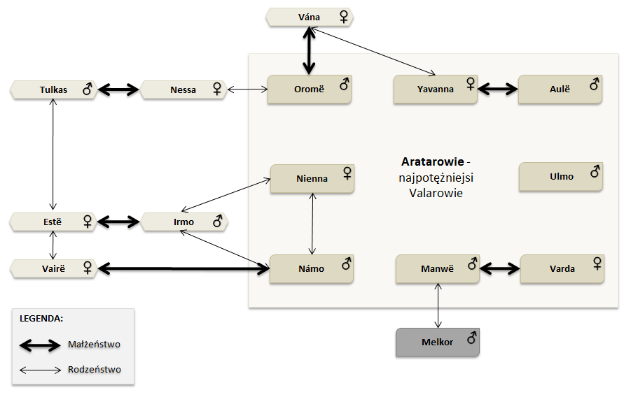 Powiązania między Valarami.